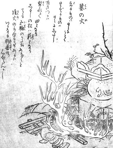 Hakanohi (墓の火) from the Konjaku Gazu Zoku Hyakki (今昔画図続百鬼)